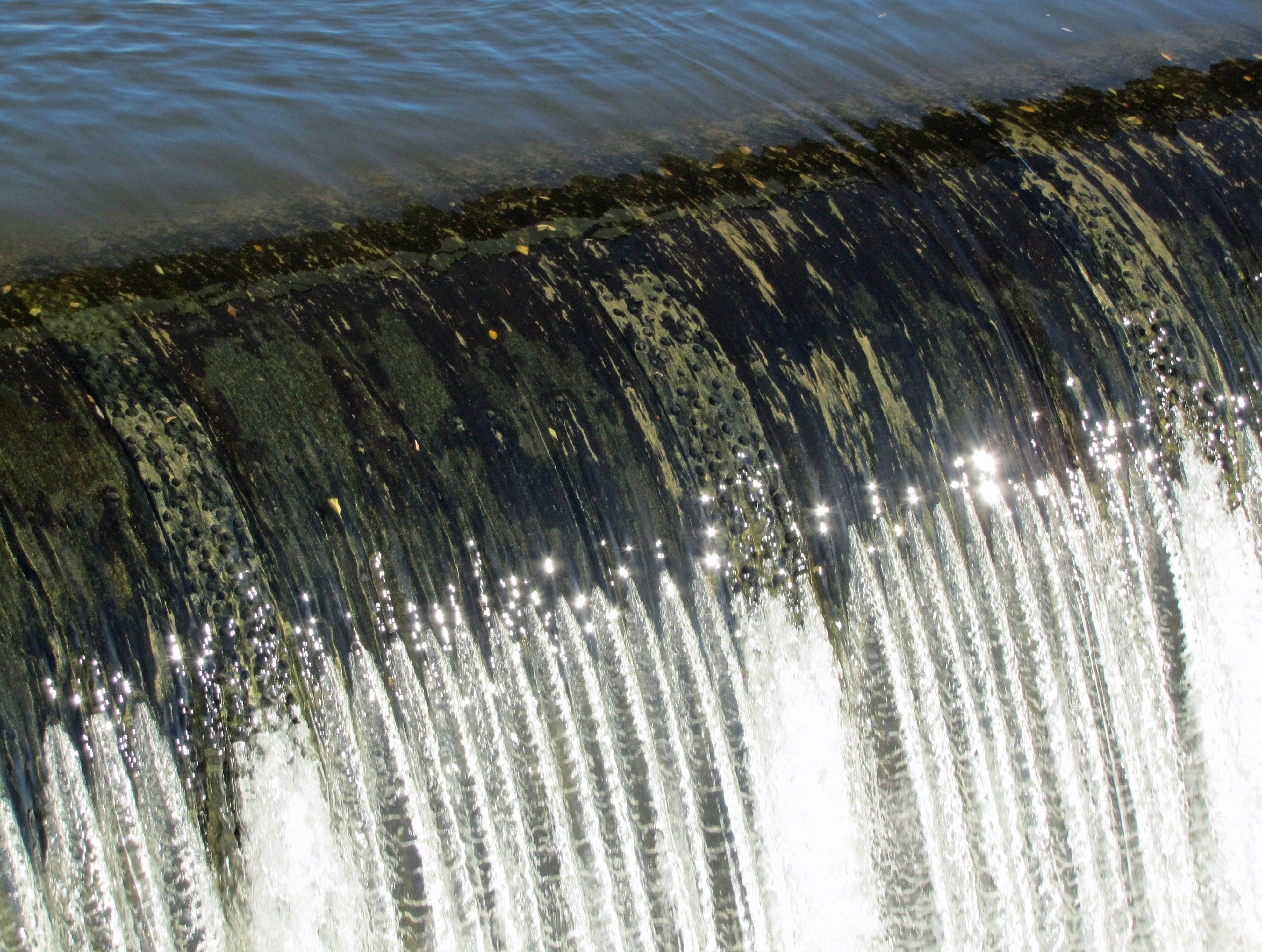 Spitzlichter auf der Wasseroberfläche, an einem Walzenwehr.